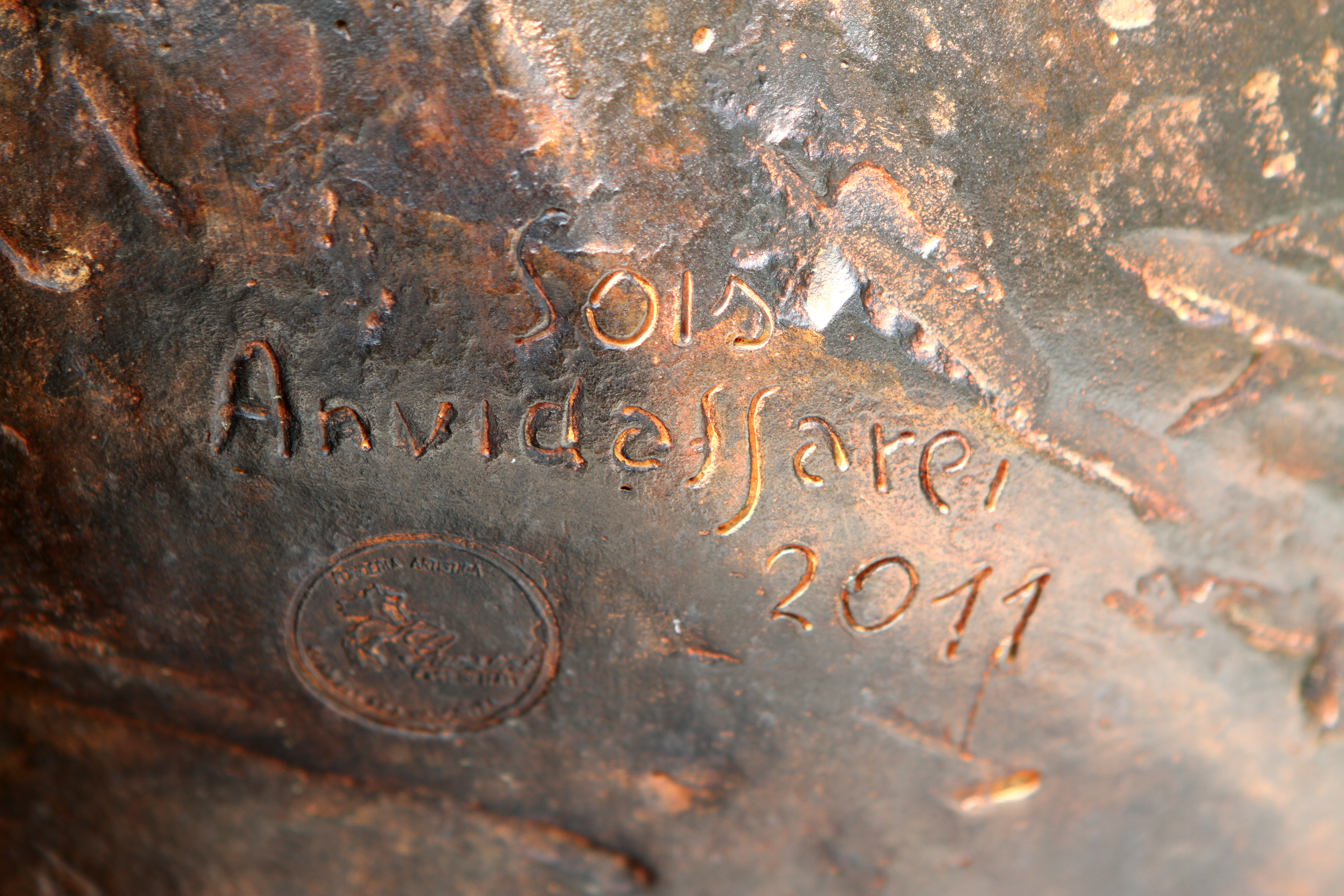 Friedrich Gulda - Denkmal